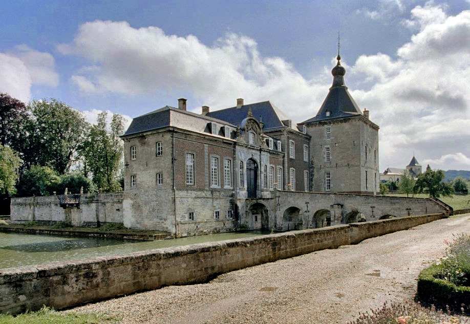 Kasteel Genhoes: Overzicht vanuit het noordoosten